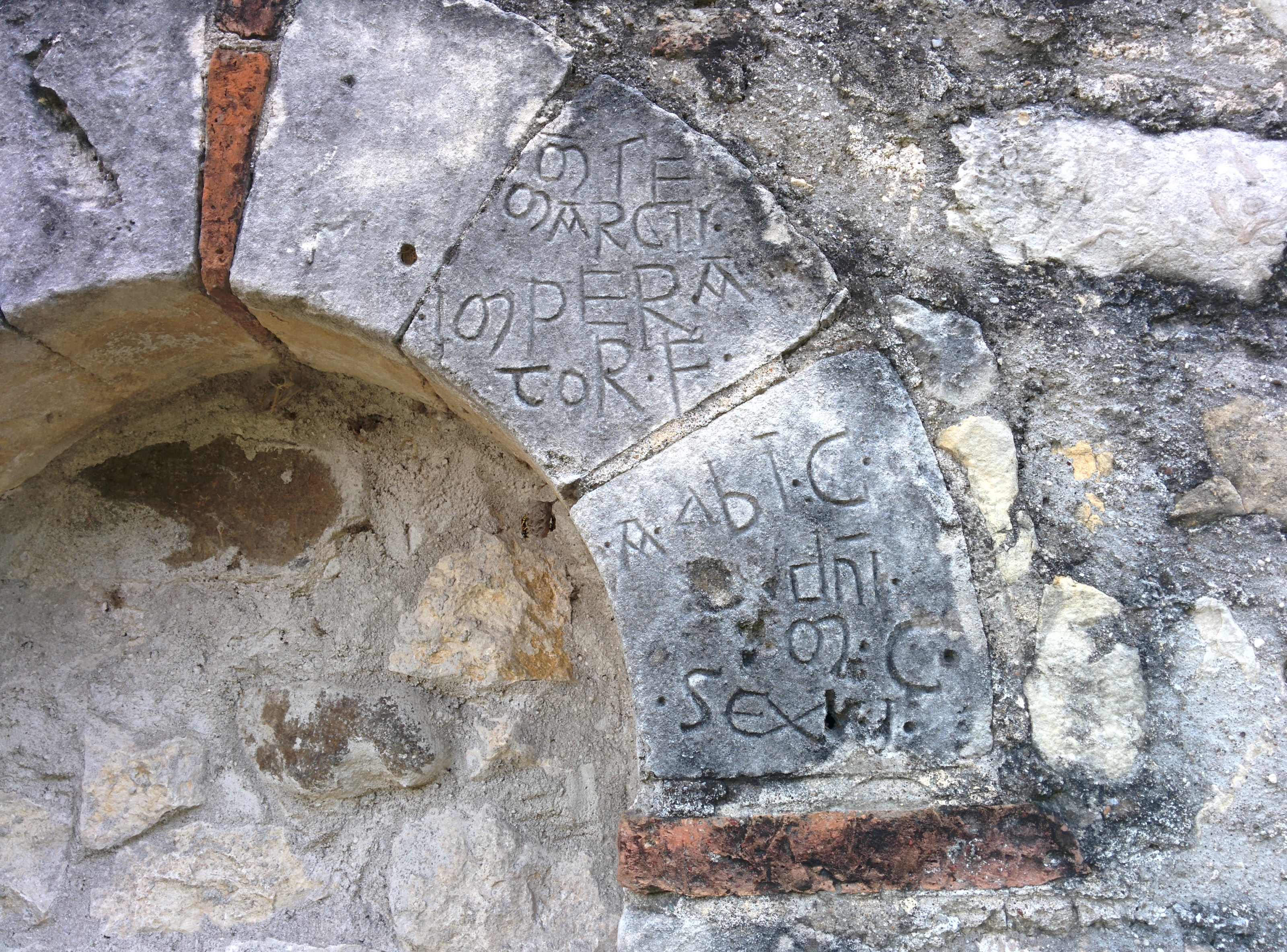 Particolare di una finestra che reca delle incisioni del 1166 nella chiesa di San Lorenzo a Castelnovo di Isola Vicentina, in provincia di Vicenza.